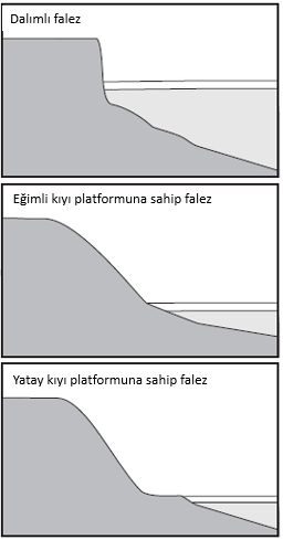 Dalımlı falez, eğimli kıyı platformuna sahip falez ve yatay kıyı platformuna sahip falez.